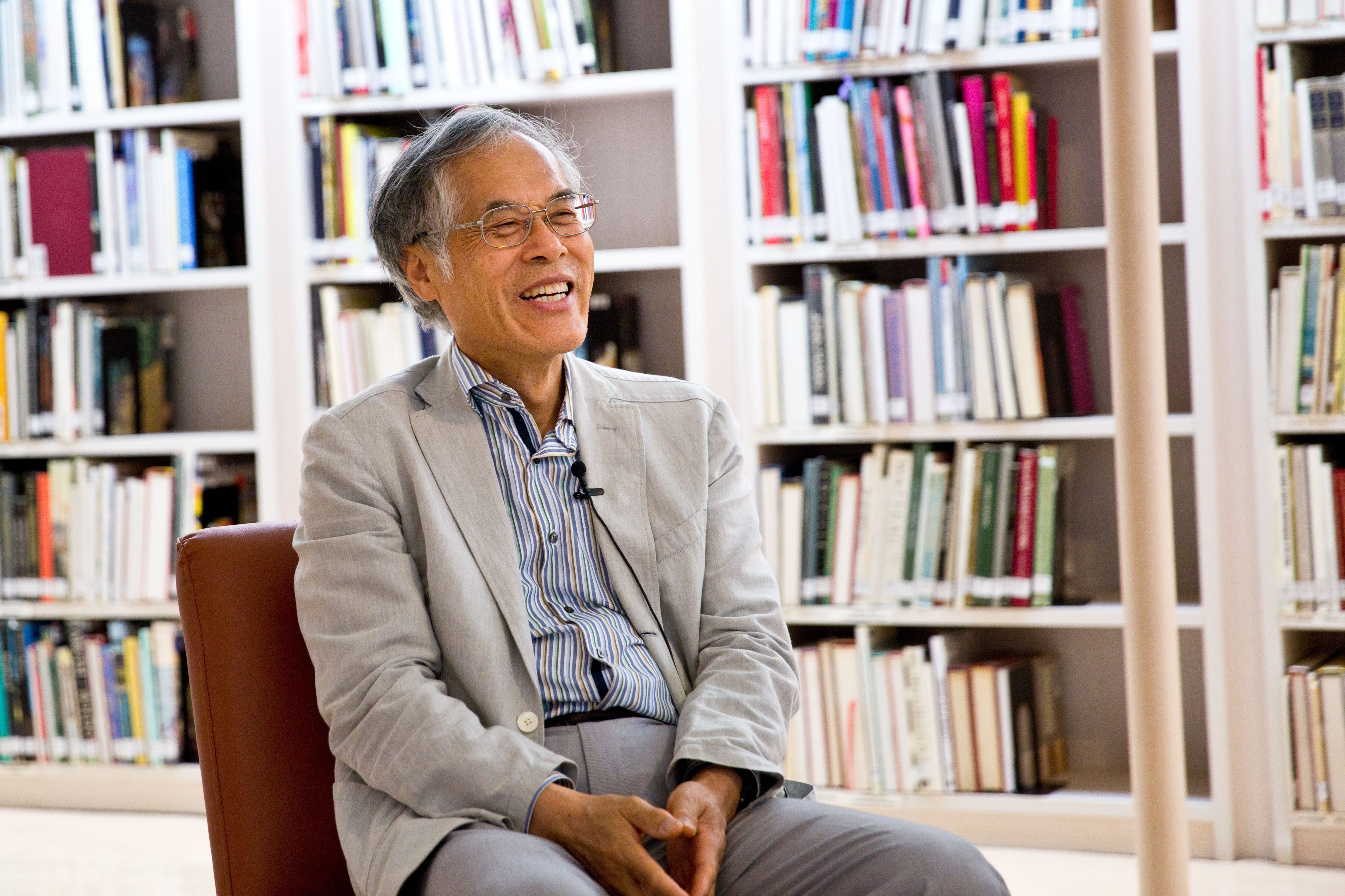 日本の建築史家・建築家の藤森照信。